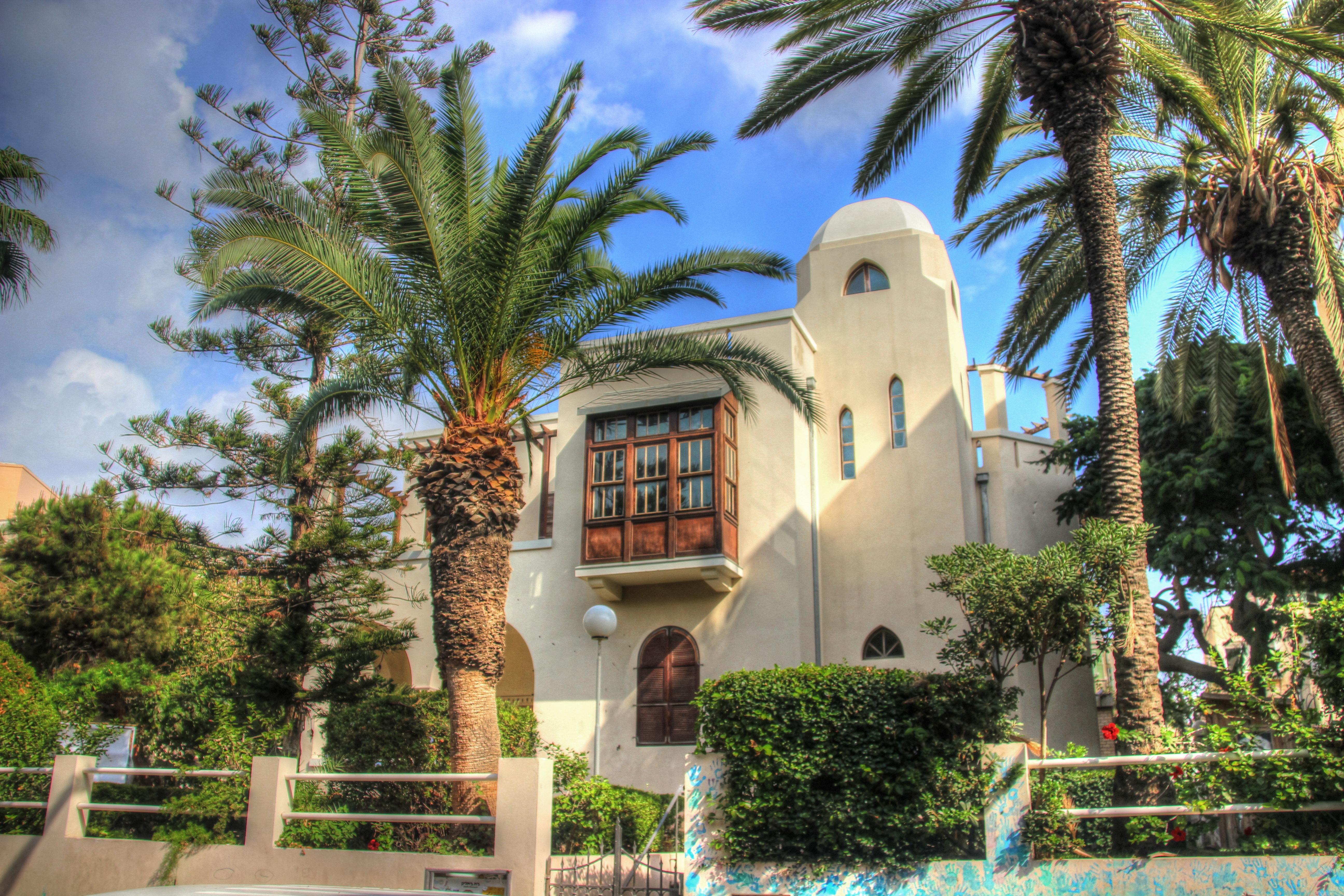 בית ביאליק הוא ביתו של המשורר הלאומי חיים נחמן ביאליק, בסמוך לבית העירייה הישן. הבית נבנה על מגרש שמימן ביאליק באמצעות הכנסות ממהדורה מיוחדת של כתביו. הבית שנחנך בשנת 1925, נבנה בסגנון האקלקטי בתכנון האדריכל יוסף מינור.